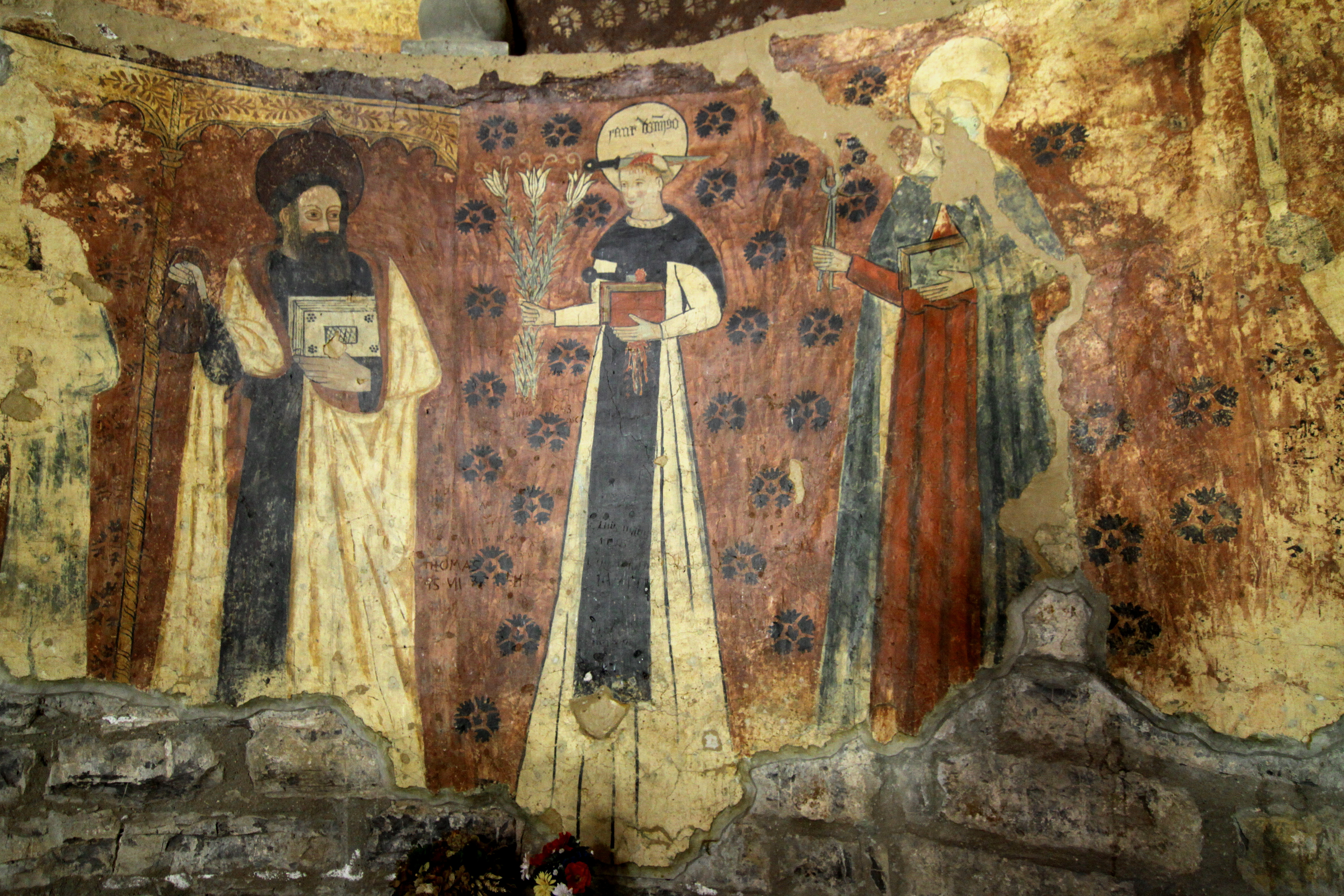 Pinturas murales de Santa María de Iguácel. Huesca